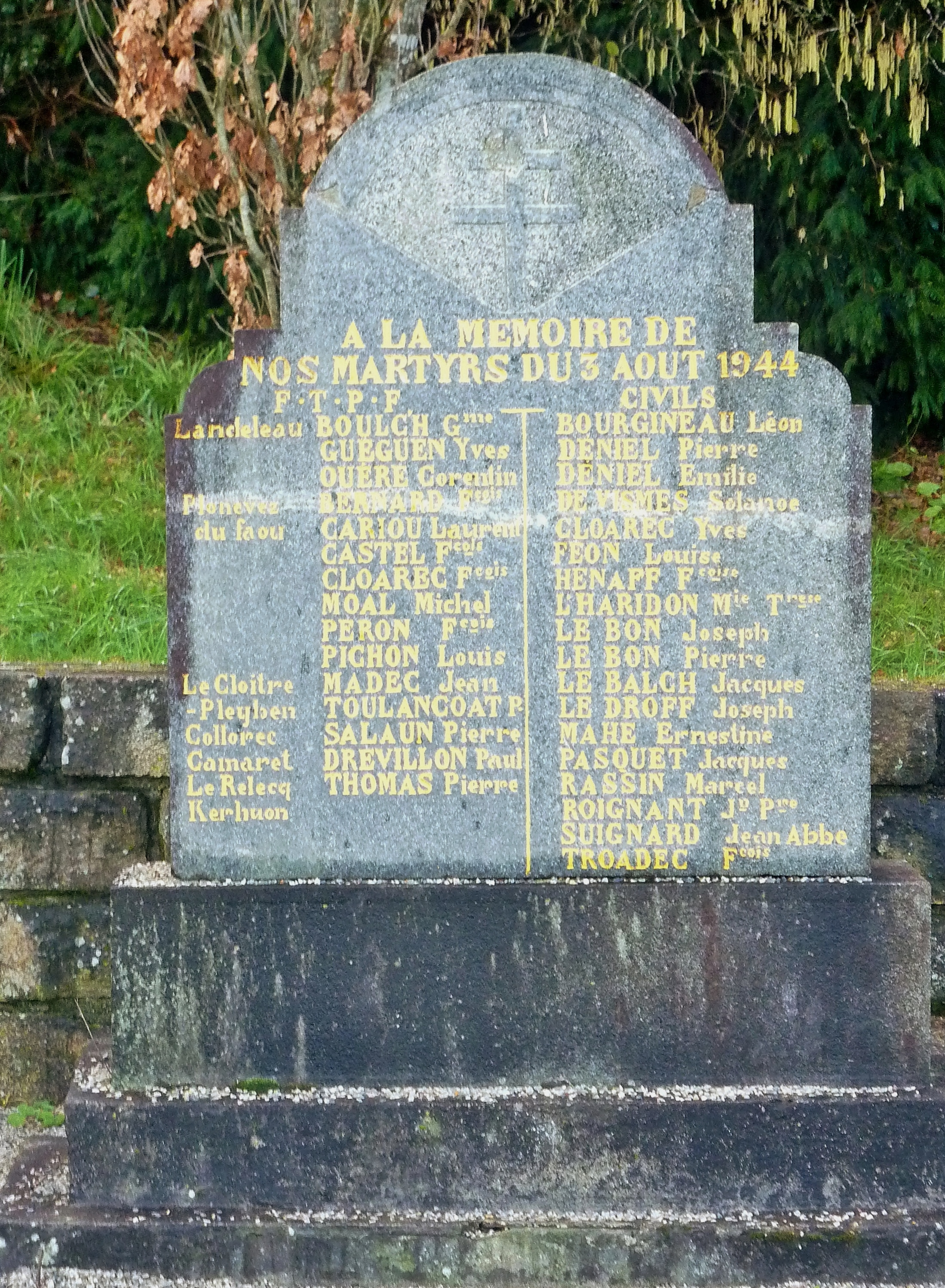 Landeleau : le monument aux martyrs du 3 août 1944 (15 jeunes maquisards tués par les Allemands)